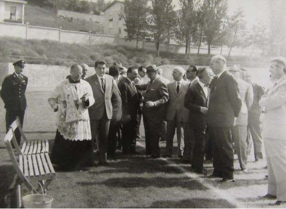 Stadio Francani inaugurazione con benedizione di don Ersilio Tonini, futuro cardinale